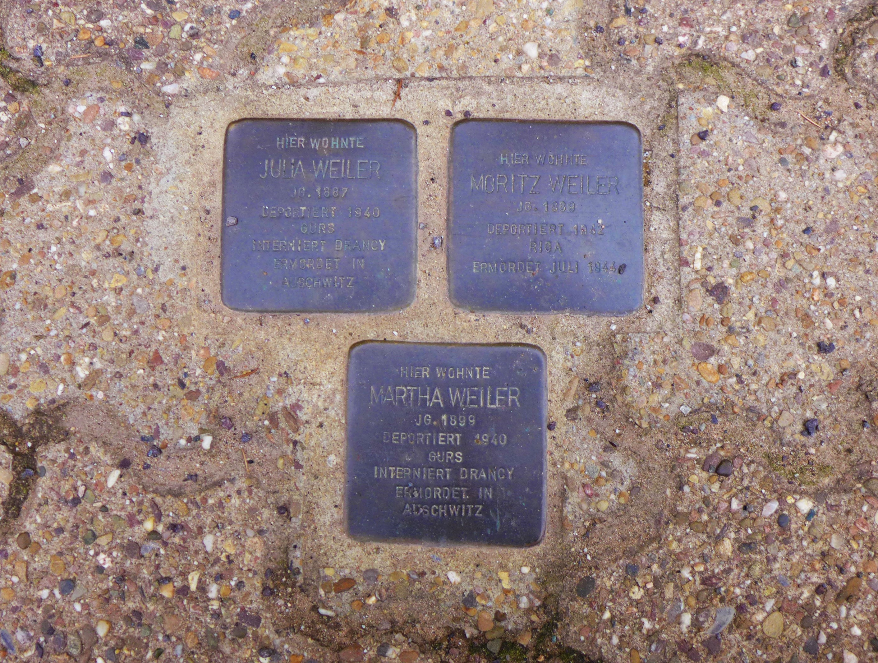 Diefflen, Düppenweilerstraße 35, Stolpersteine für Julia, Moritz und Martha Weiler